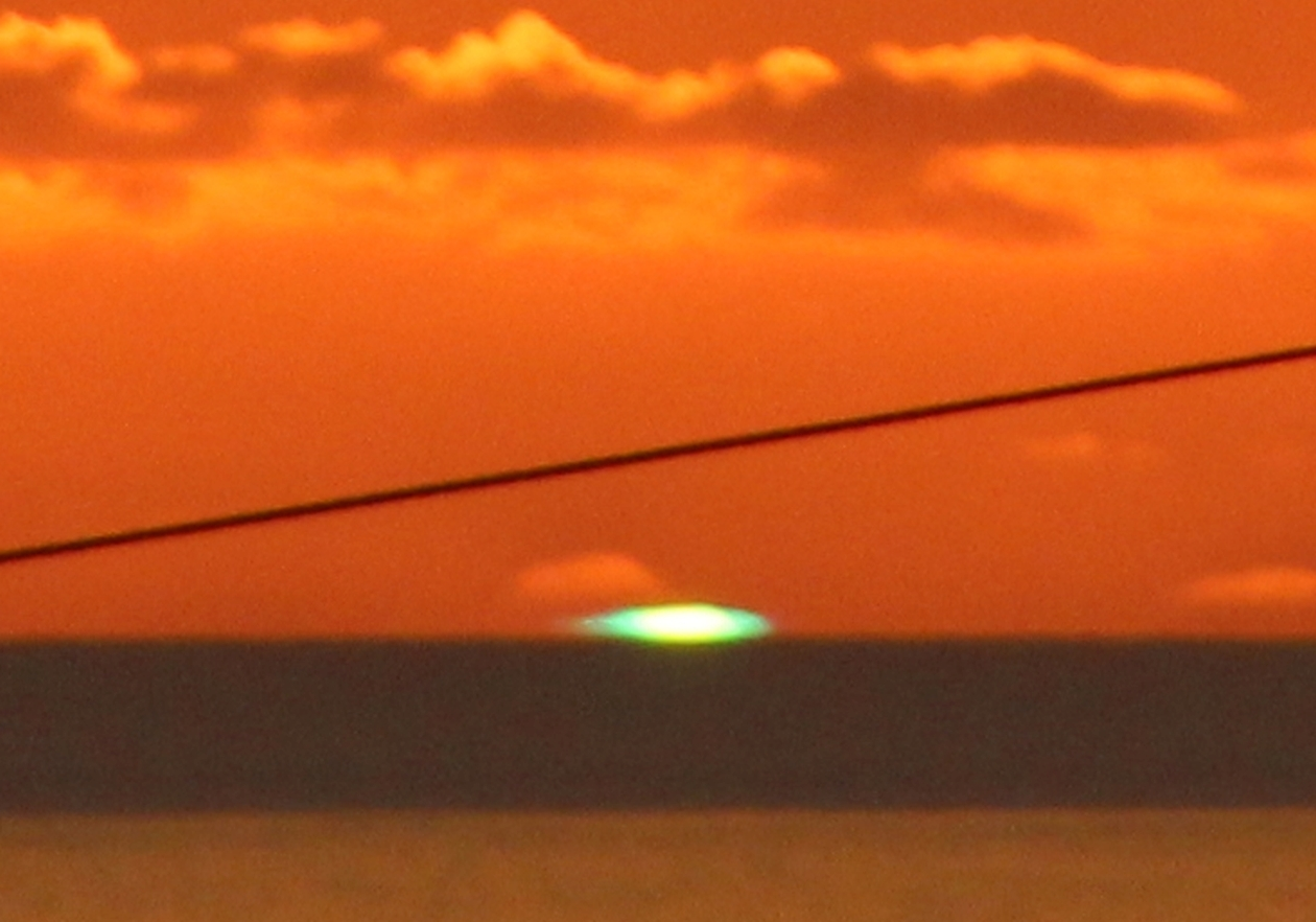 Fast perfekter Grüner Strahl. Vergrößerter Ausschnitt von Sonnenuntergang vor Estreito da Calheta am 12. Dezember 2016 IX